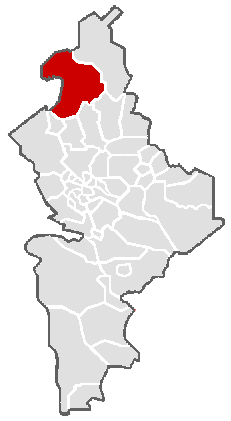 Ubicación geográfica del municipio de Lampazos de Naranjo en el estado mexicano de Nuevo León.